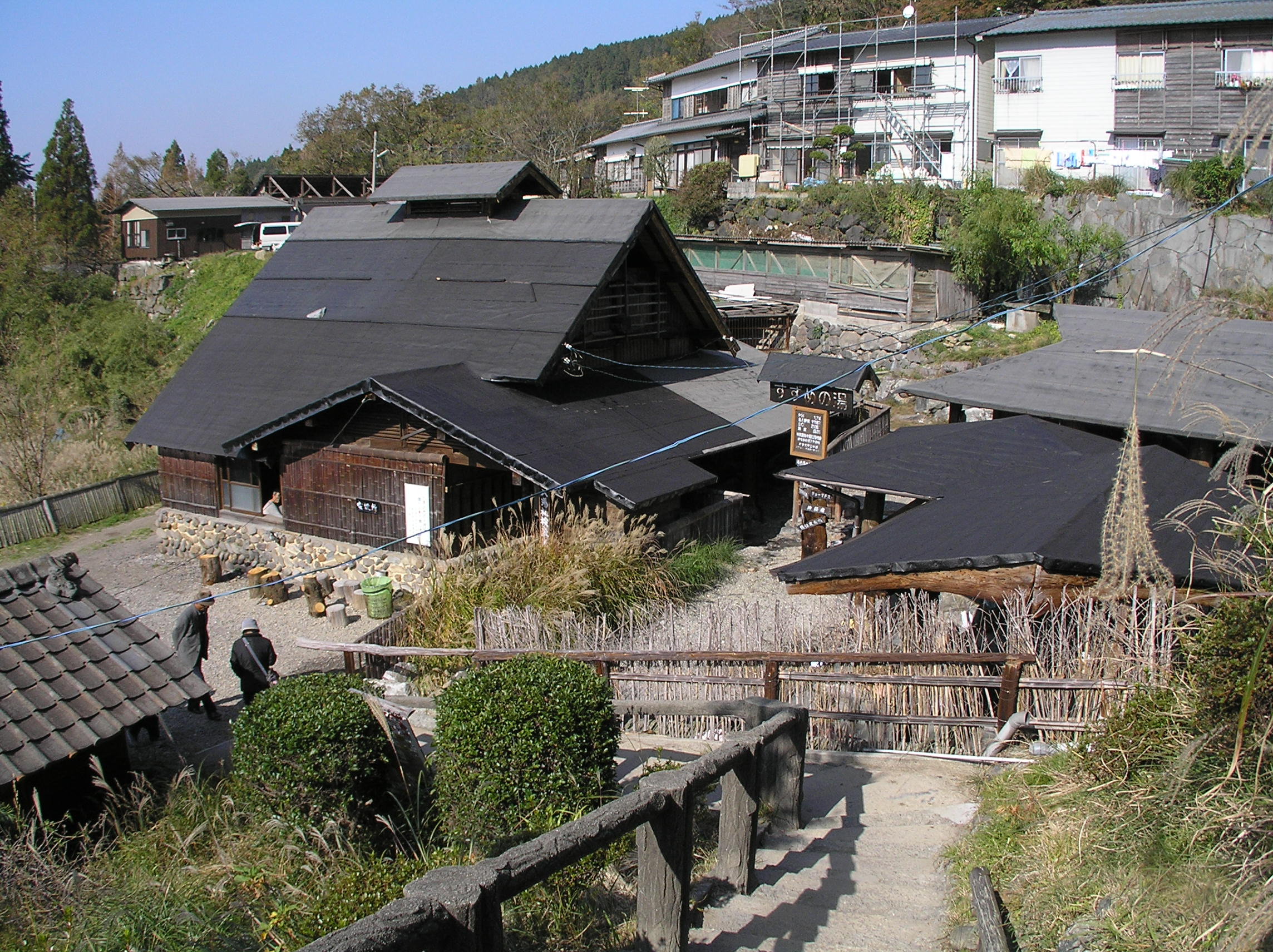 地獄温泉「清風荘」.【おぉたむ すねィく探検隊】秘湯発掘班 丸園半輔 ～photo by Autumn Snake